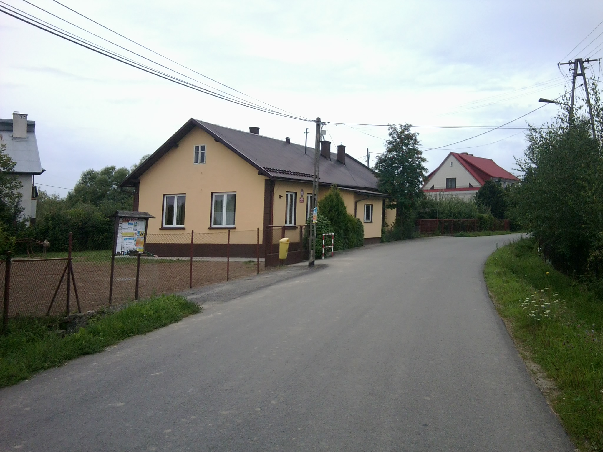 Szkoła podstawowa w Mokrej Wsi